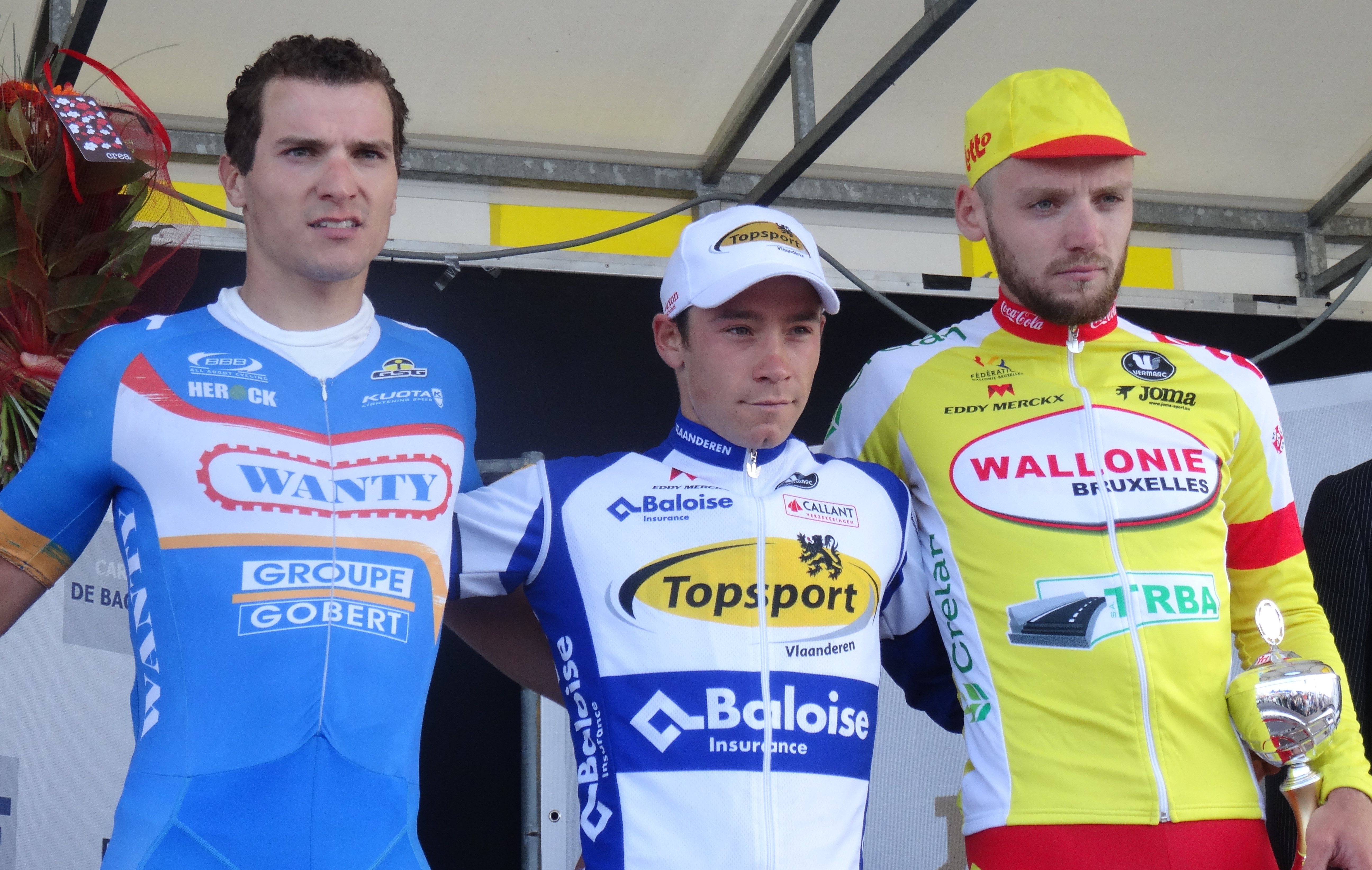 Reportage photographique réalisé le samedi 13 septembre à l'occasion du départ et de l'arrivée de la Flèche côtière 2014 à Heist (Knokke-Heist), Belgique.